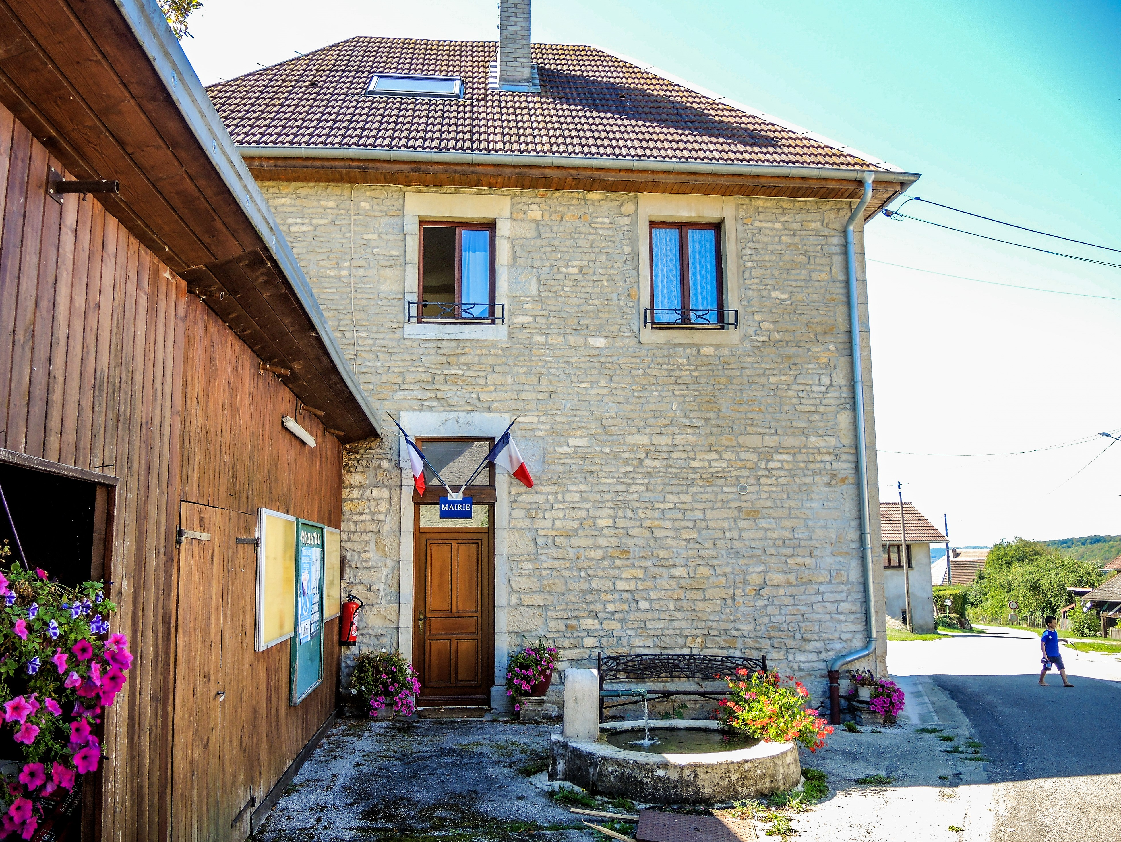 Mairie de Montivernage. Doubs